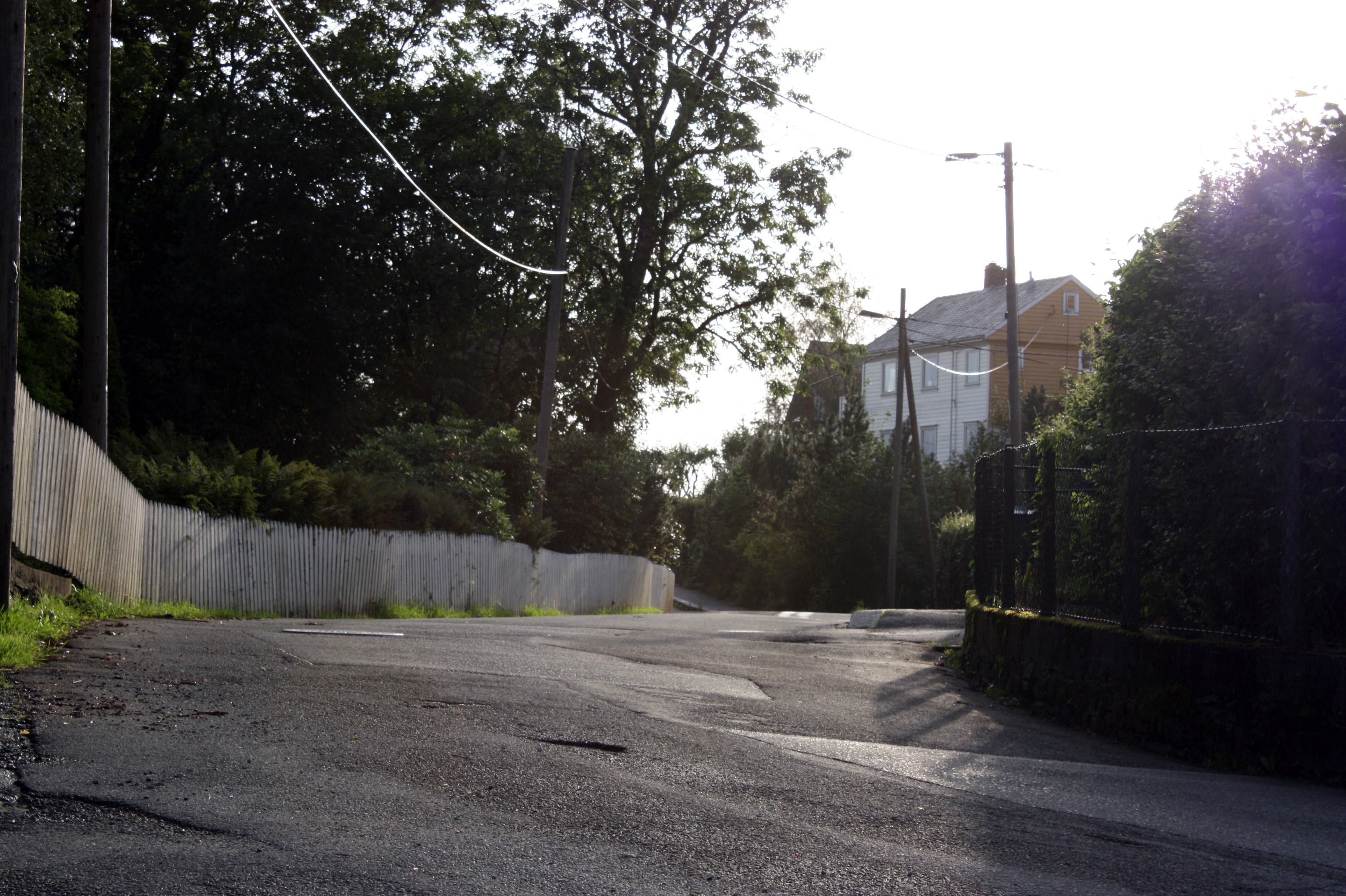 Østre Hopsvegen, Fana, Bergen.